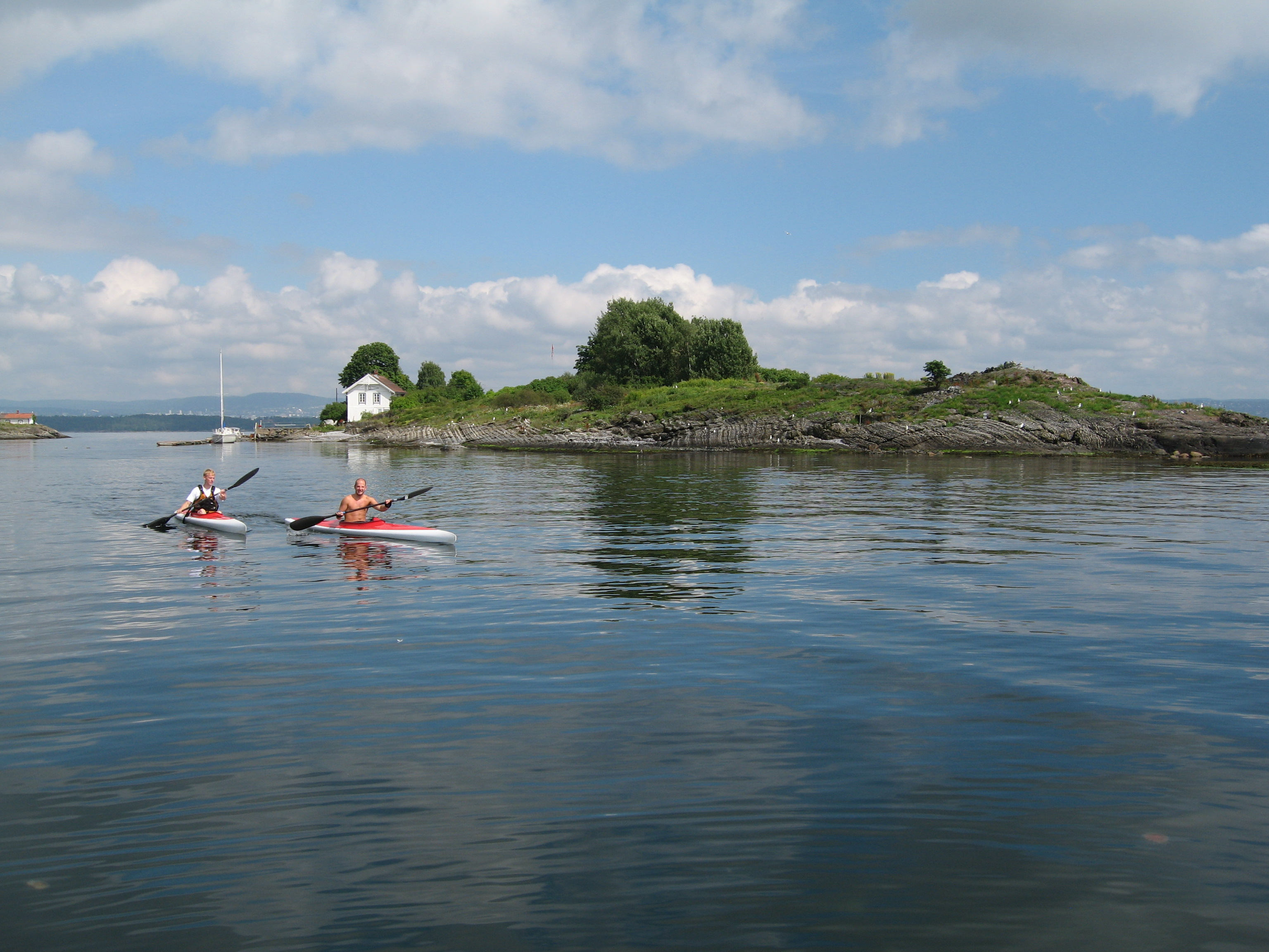 Ytre Vassholmen, Indre Oslofjord med padlere, jpg